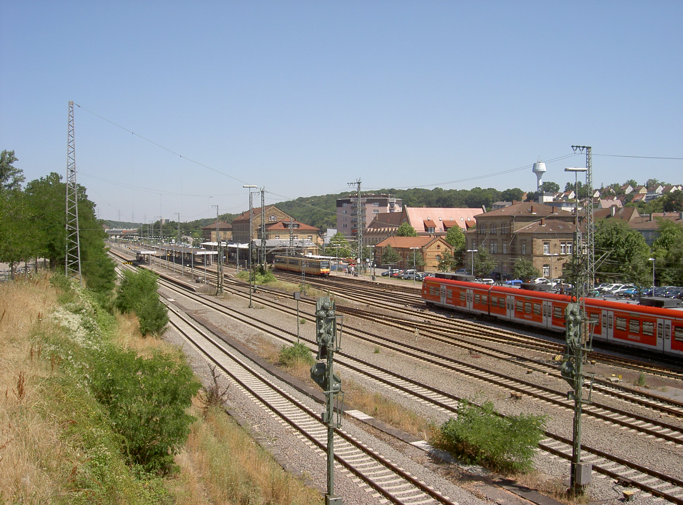 Bahnhof Mühlacker